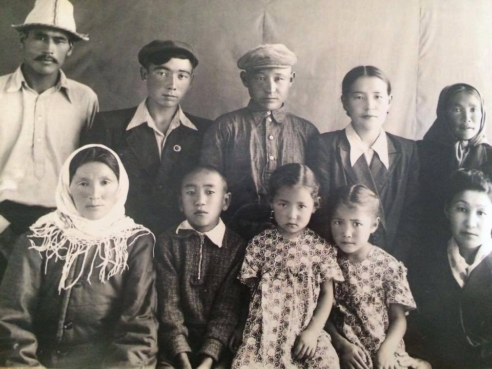 Какиш с дочерьми, матерью, сетрой, братьями